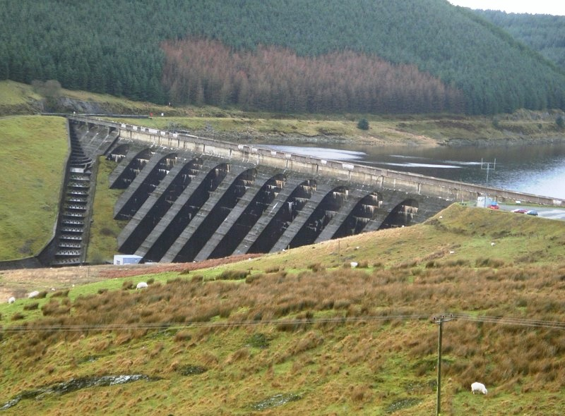 Nant y Moch dam